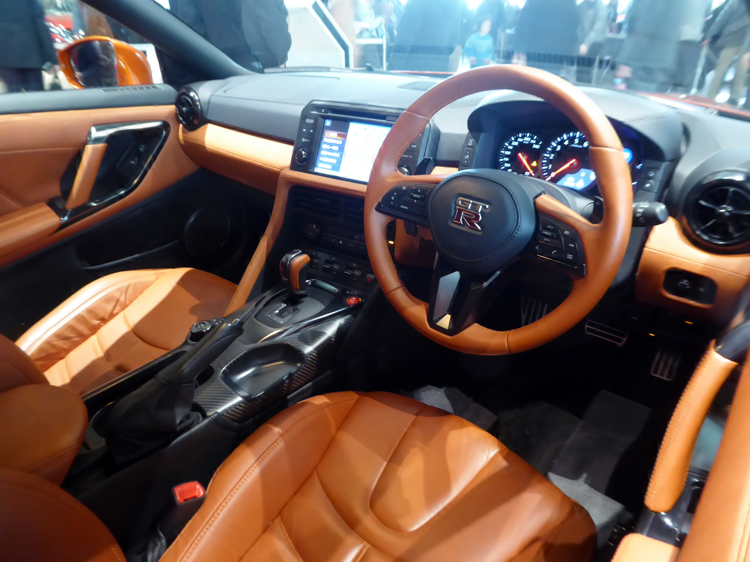 日産グローバル本社ギャラリーにて2017年式日産・GT-Rプレミアムエディションのインテリアを撮影。